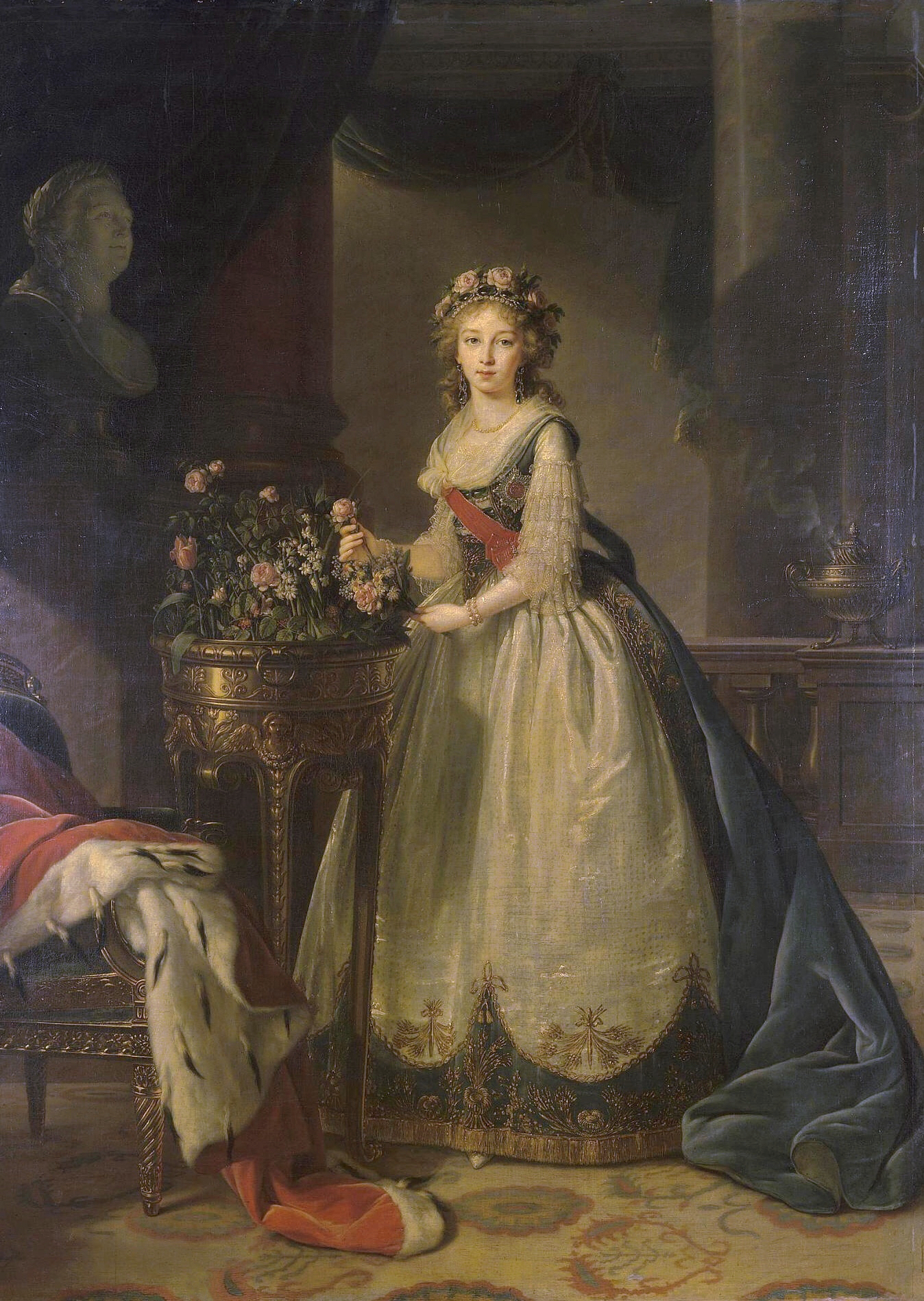 Из каталога Эрмитажа: "Портрет великой княгини Елизаветы Алексеевны. ГЭ 1283. Холст, масло. 262,5х200. Изображена великой княгиней, в придворном костюме с лентой ордена св. Екатерины через плечо. Портрет исполнен в 1795 году по заказу Екатерины II, находился до 1918 году в Романовской галерее Зимнего дворца. Судя по воспоминаниям Виже-Лебрен, она исполнила два поясных и два погрудных повторения. Одно из поясных - как копия с оригинала Виже-Лебрен, принадлежащая Эрмитажа и взятая из Гатчинского дворца, была на Исторической выставке портретов (1870)".